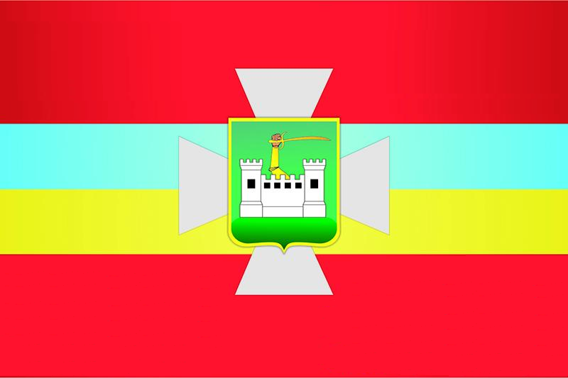 Прапор Чуднова